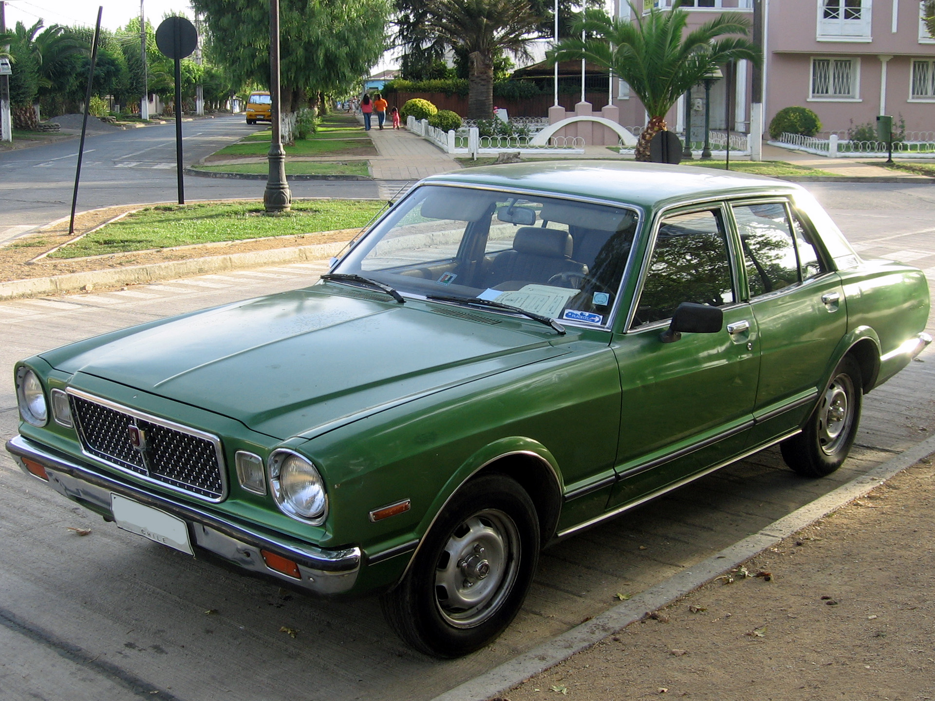 Toyota Cressida 2000 1979